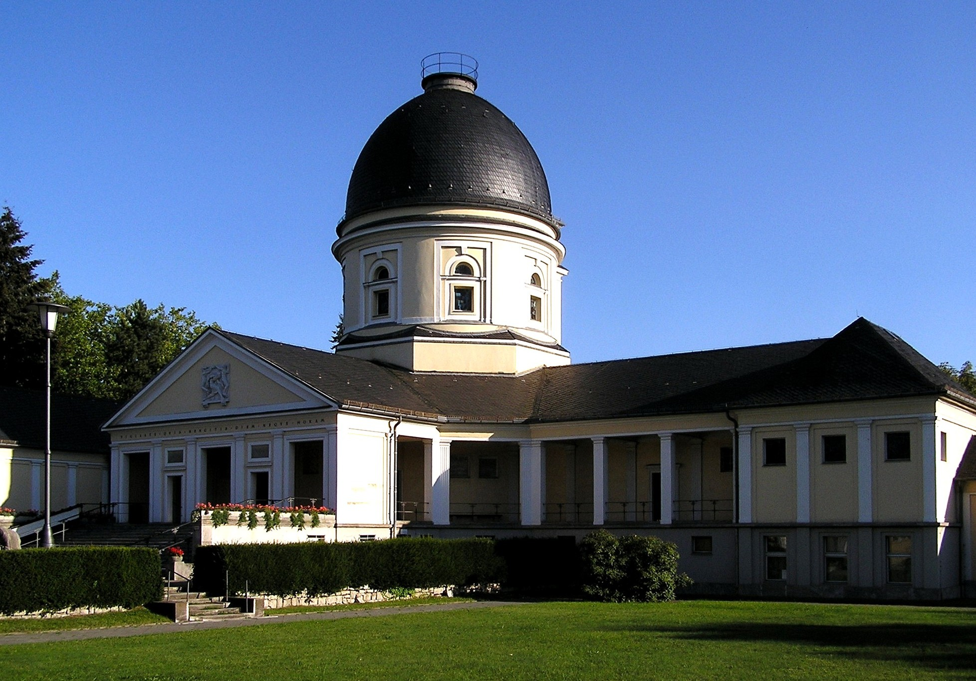 Krematorium Wilmersdorf auf dem Gelände des Friedhofs Wilmersdorf in Berlin